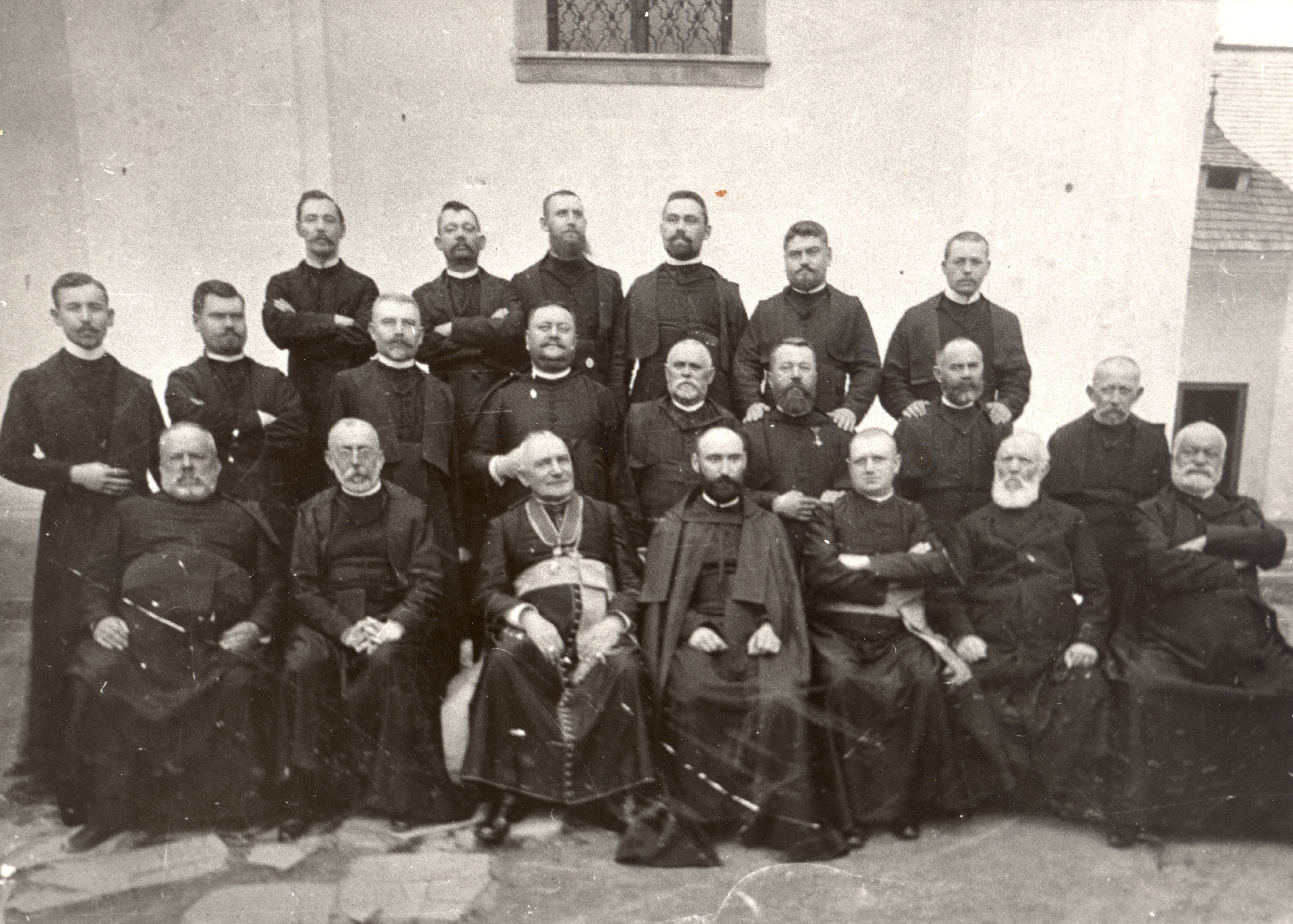 Kapitula baziliánov v Krásnobrodskom monastieri r. 1909